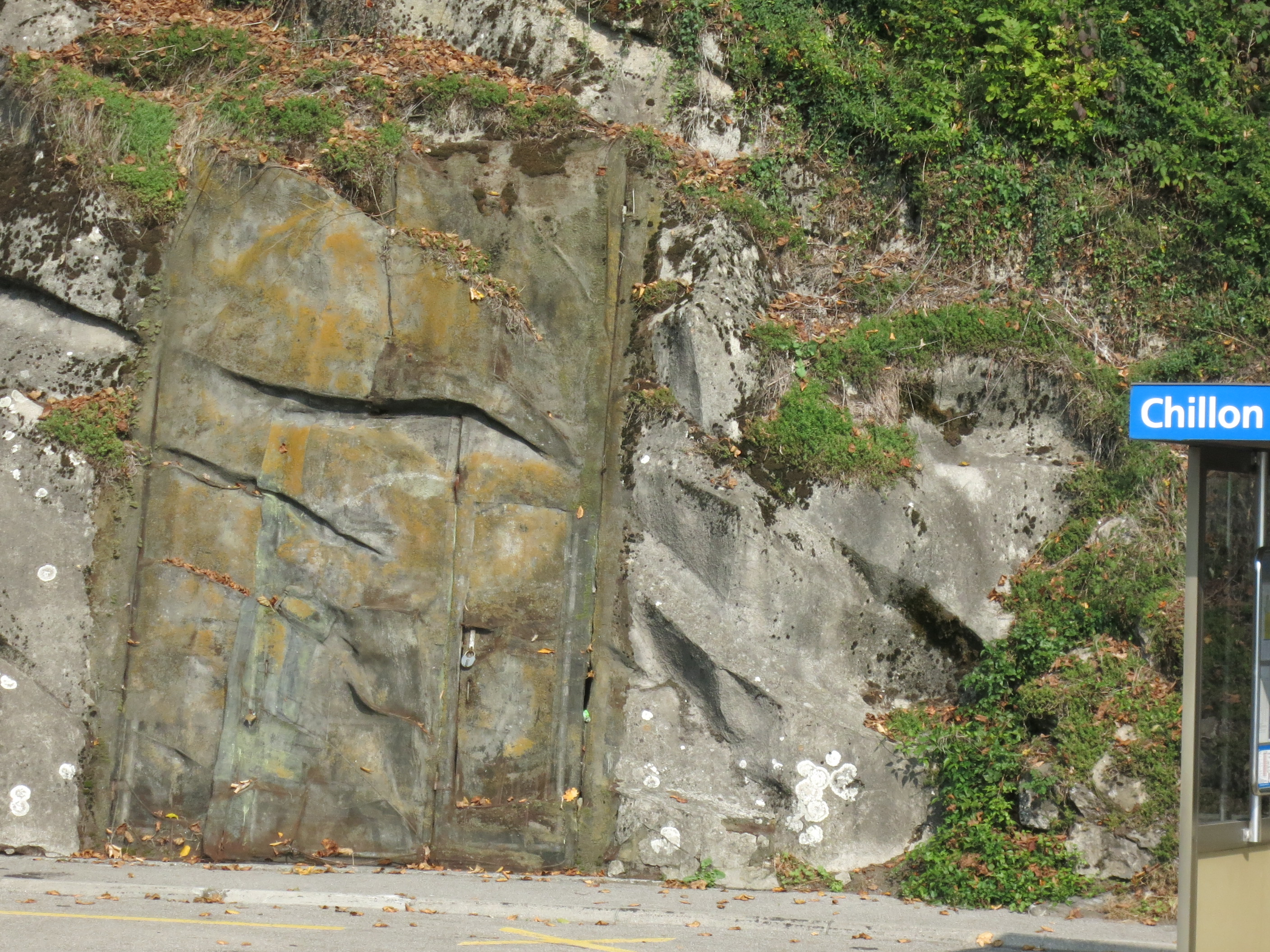 Sperrstelle Chillon VD, Schweiz